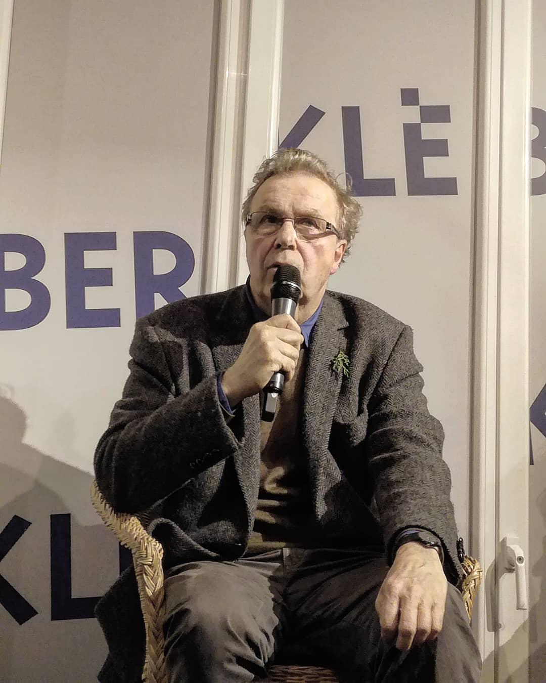 le 24 janvier 2018 à la Librairie Kléber de Strasbourg